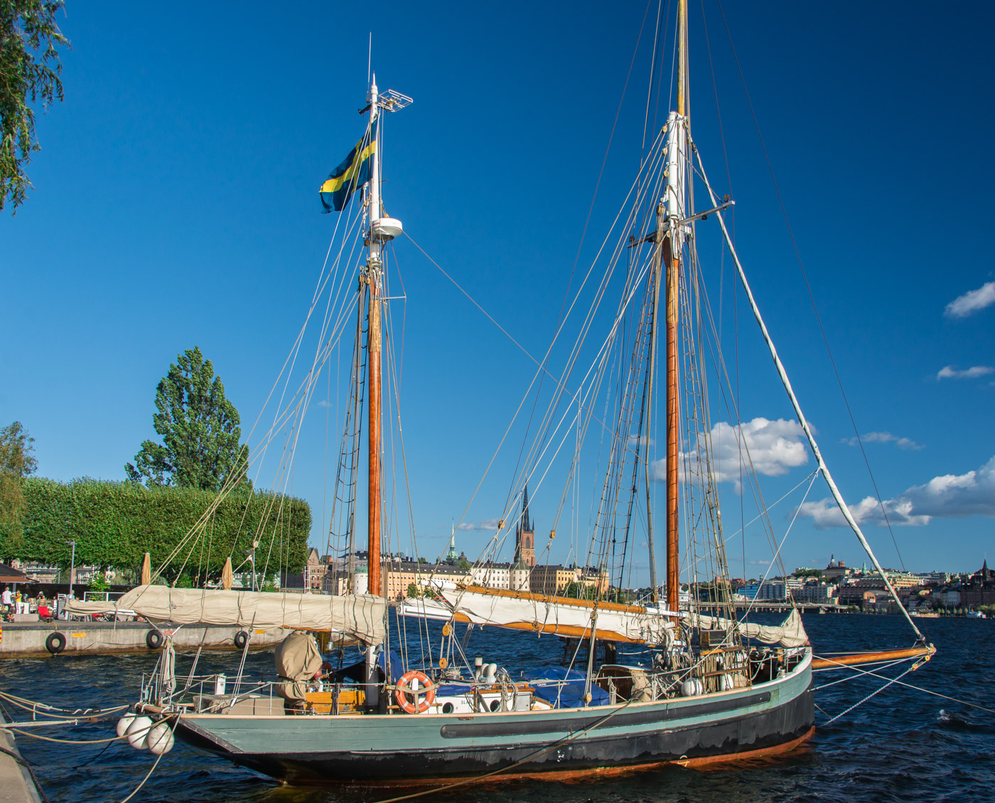 Brixhamtrålaren S/V Tibnor, riggad som en gaffelketch, vid kajen på Norrmälarstrand i Stockholm den 29 augusti 2015.